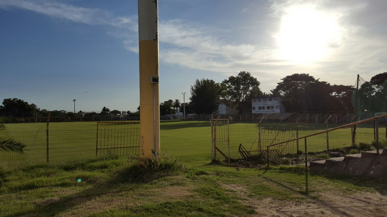 Estadio José Nasazzi